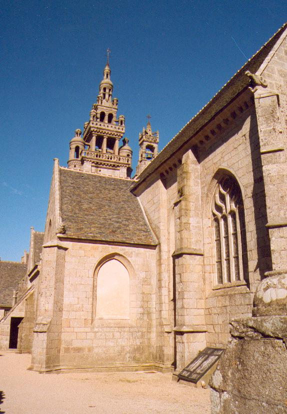 église de Roscoff dans le Finistère